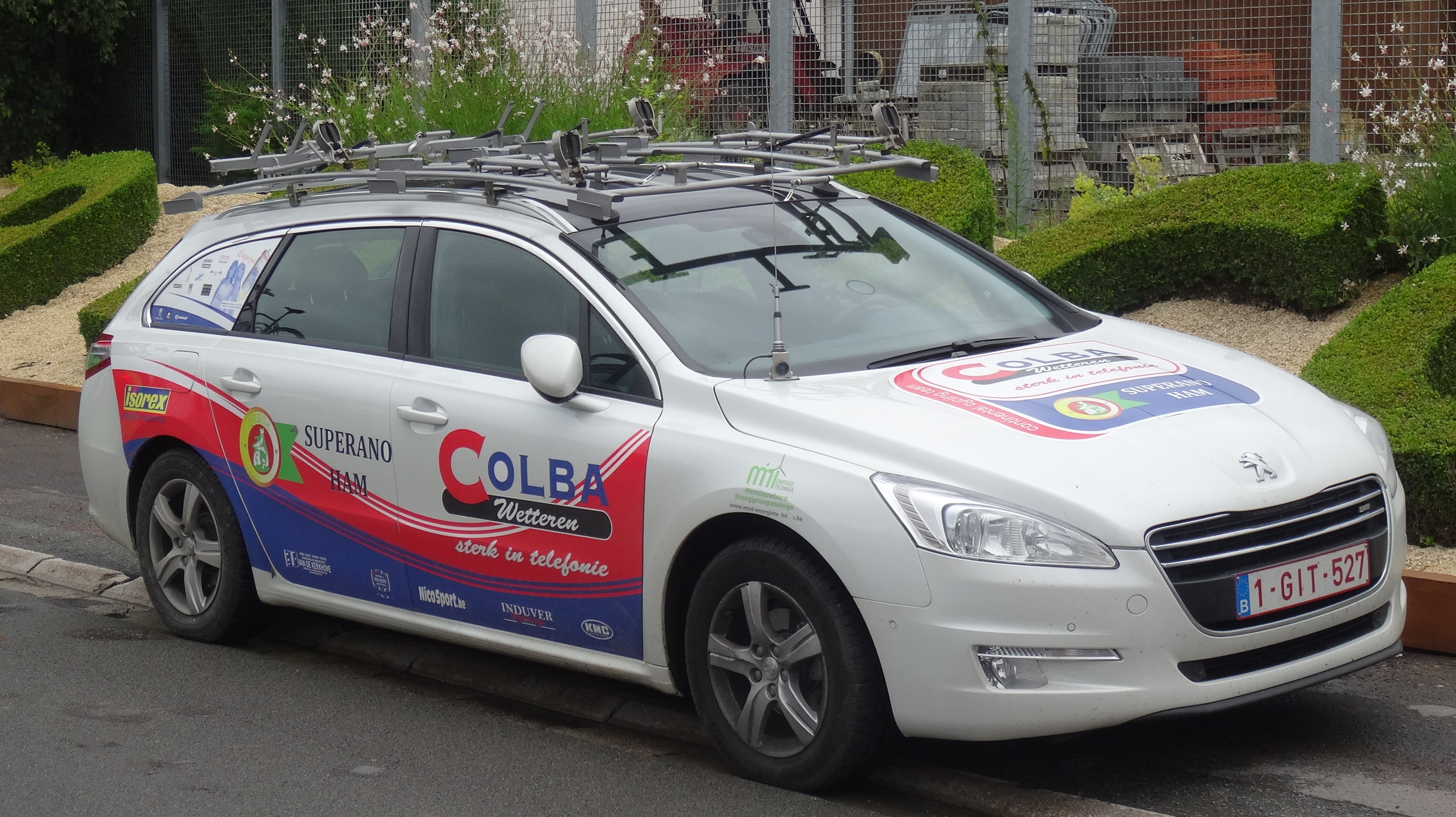 Reportage photographique réalisé le dimanche 13 juillet à l'occasion du départ et de l'arrivée de la Ronde pévéloise 2014 à Pont-à-Marcq, Nord-Pas-de-Calais, France.